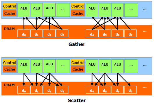 atminties adresavimas